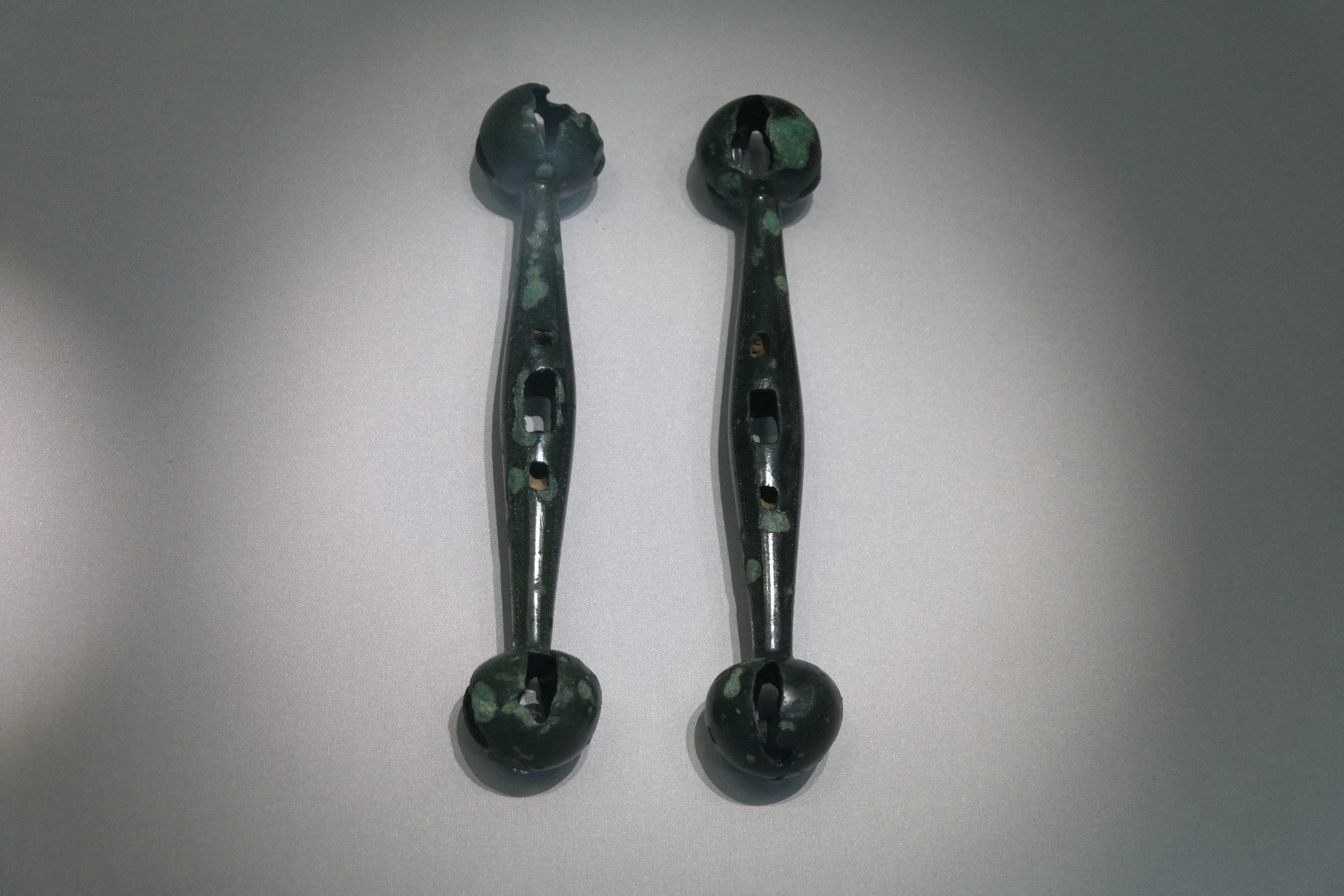 대한민국 국보 제143호 "화순 대곡리 청동기 일괄" 중 쌍두령(雙頭鈴). (국립광주박물관 소장)